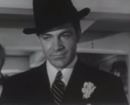 映画「教授と美女」のオリジナル予告編よりダナ・アンドリュース演じる暴力団の親玉ジョー・ライラック